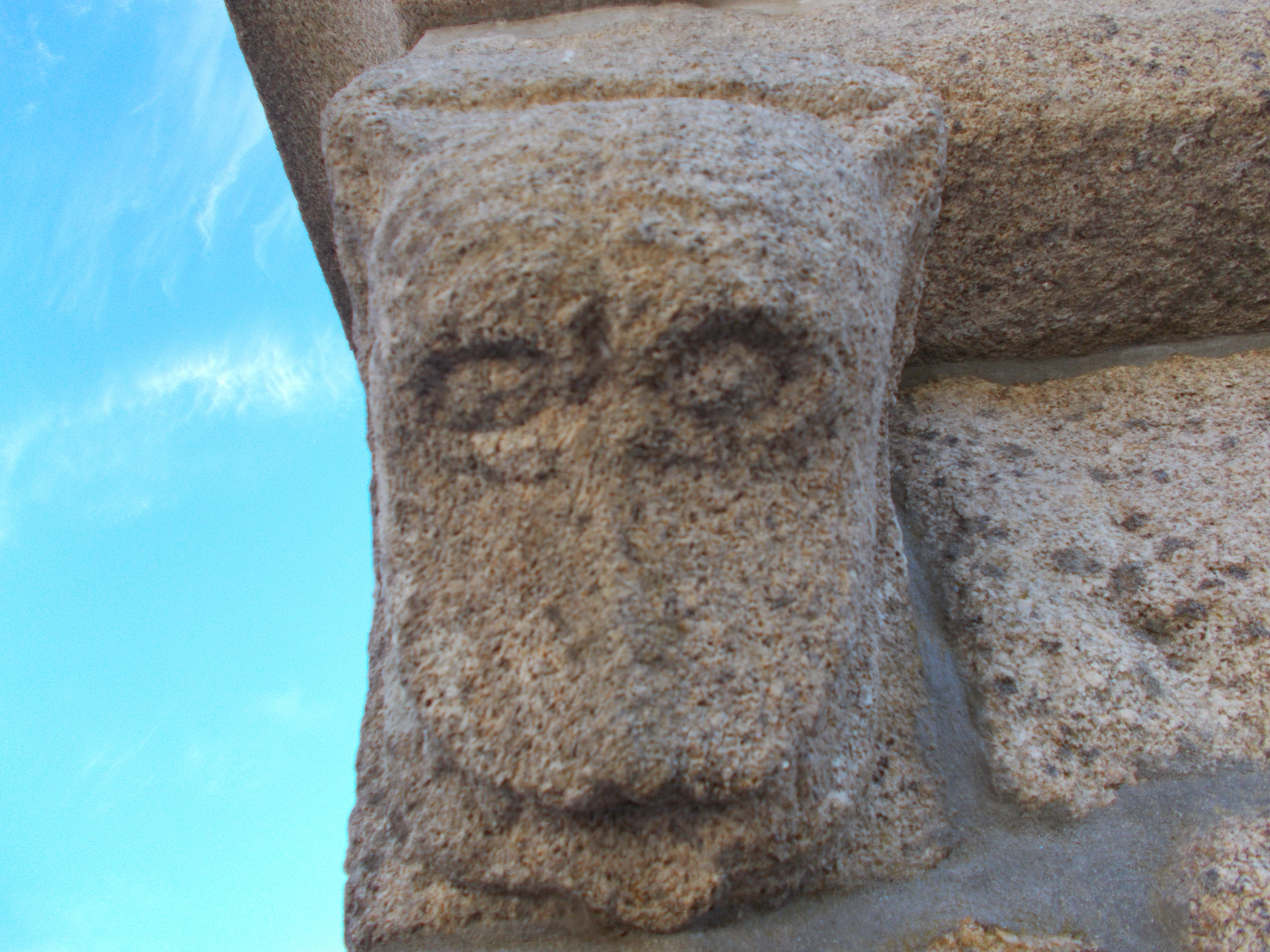 Pormenor da Igreja de Pedregais, no concelho de Vila Verde, em Portugal.